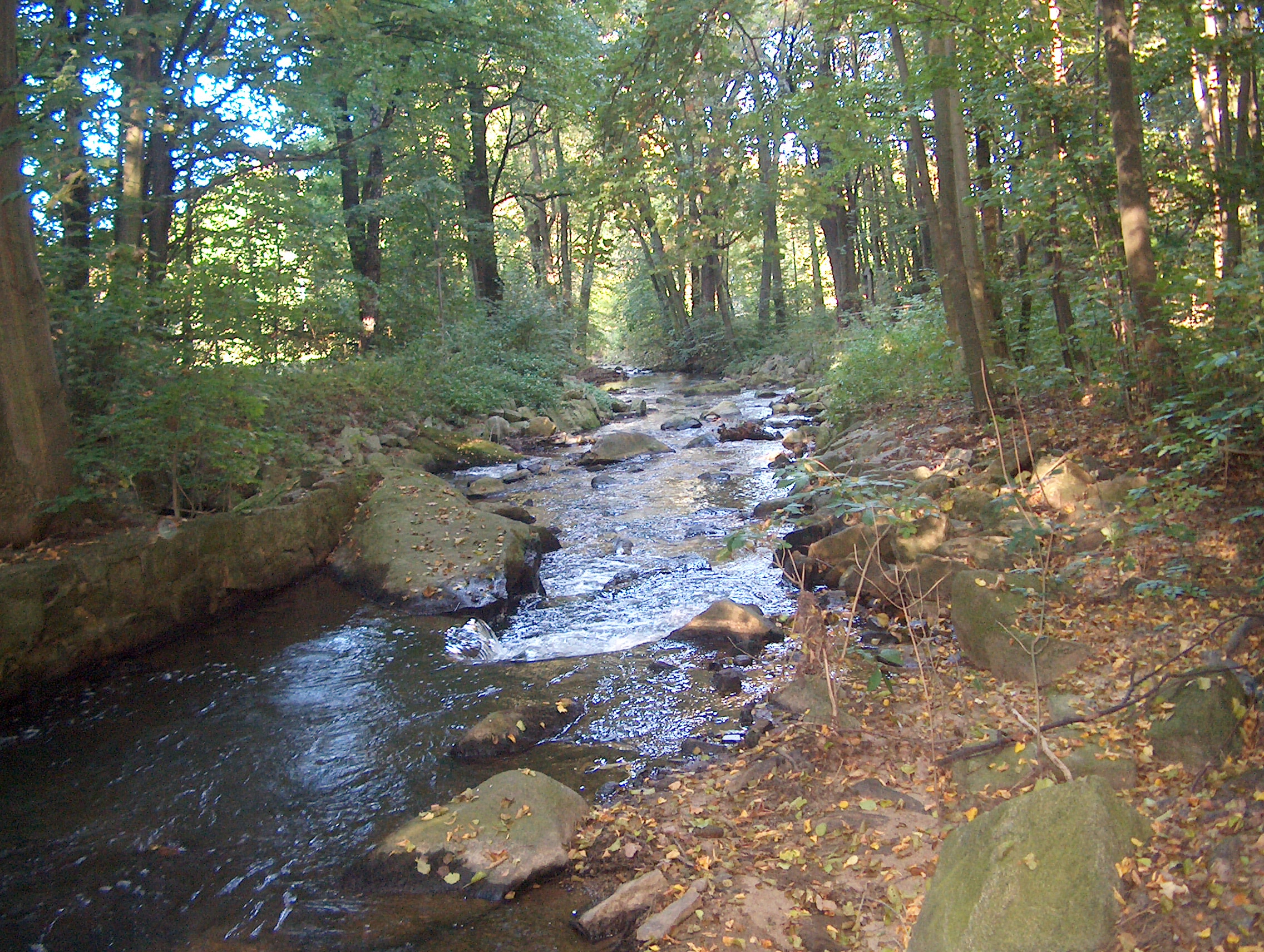 Nedaschützer Skala Hornjoserbsce: Čornica w Njezdaščanskej skali